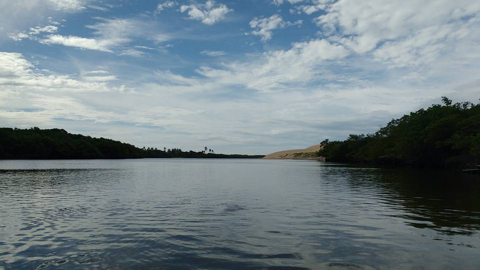 Rio Parnaíba - Manguezal na foz do rio